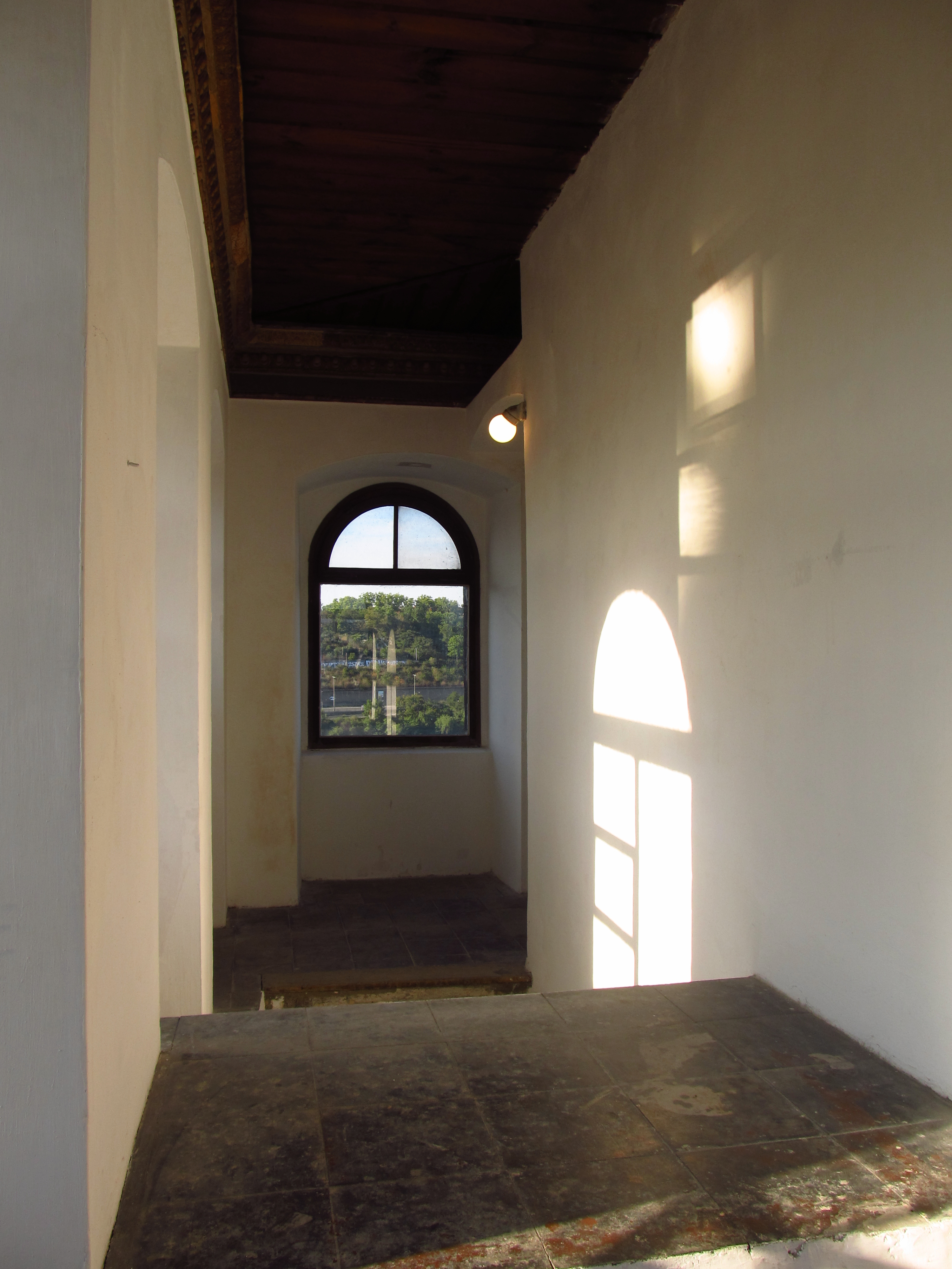 Česky: Poslední patro věže, průhled oknem na Letnou.